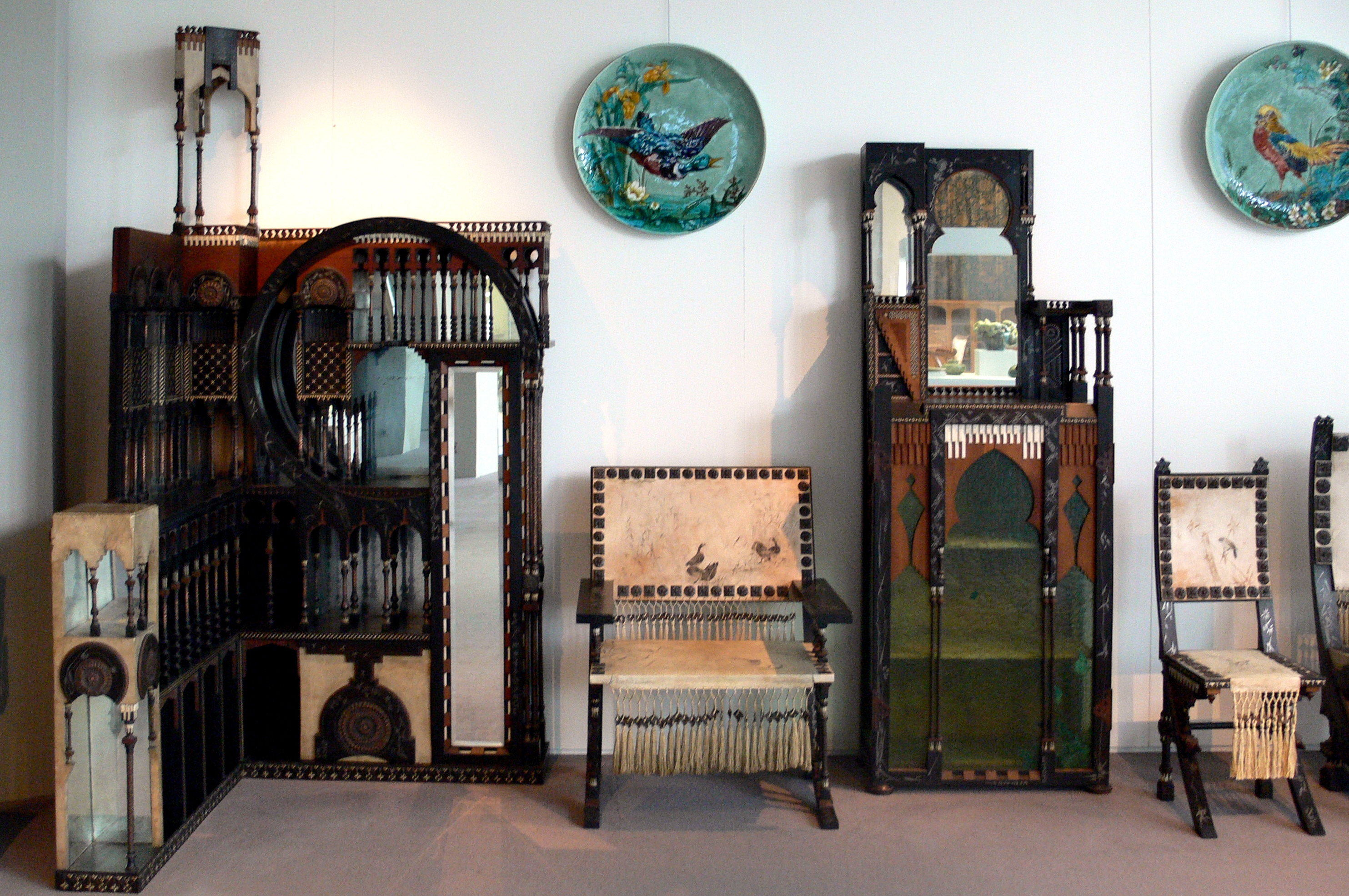 Salonmobiliar von Carlo Bugatti, Mailand um 1885 Kunstgewerbemuseum Berlin, Inv. Nr. W-1973,28 (außerdem zwei Bildplatten mit Vogelmotiven; Optat Milet, Sèvres um 1880; Inv. Nr. W-1991,1a–b)